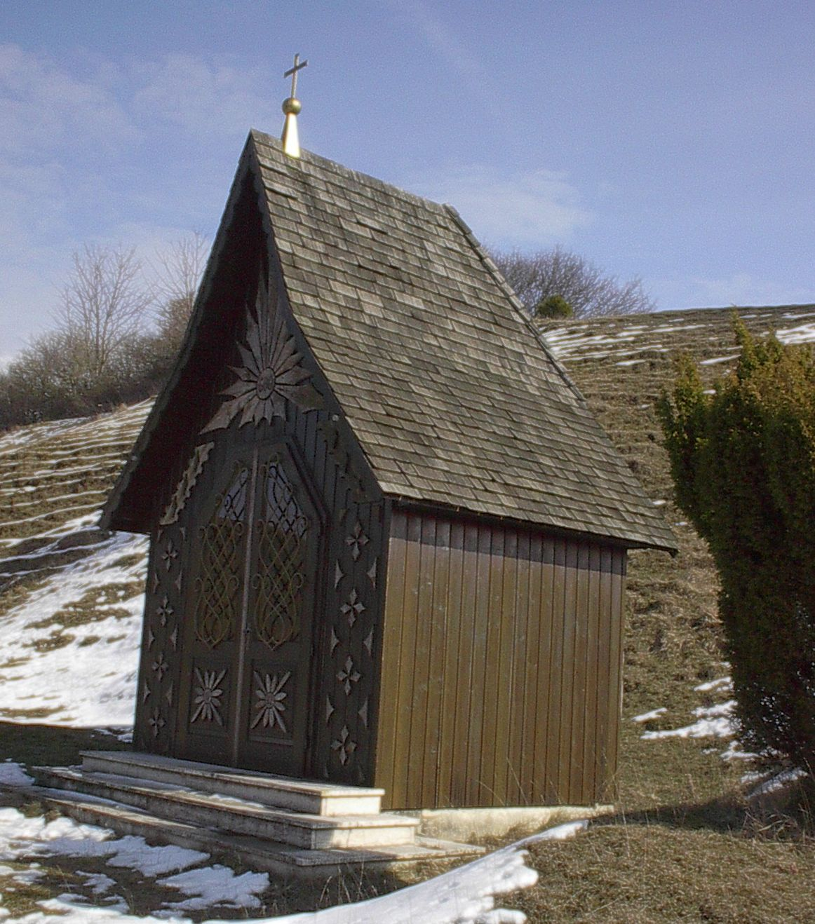 Die Kapelle von Illdorf ist ein kleines Kunstwerk aus Holz